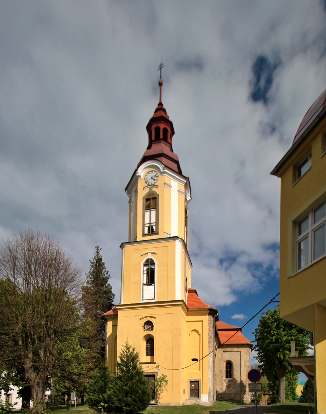 Stráž pod Ralskem kostel